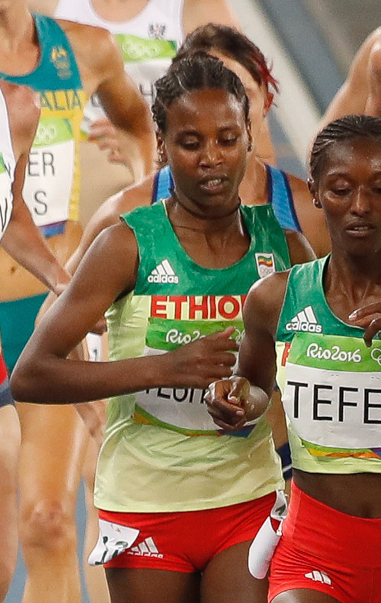 Rio de Janeiro - A queniana Vivian Jepkemoi Cheruiyot vence final e bate recorde olímpico dos 5 mil metros nos Jogos Rio 2016, no Estádio Olímpico (Fernando Frazão/Agência Brasil)